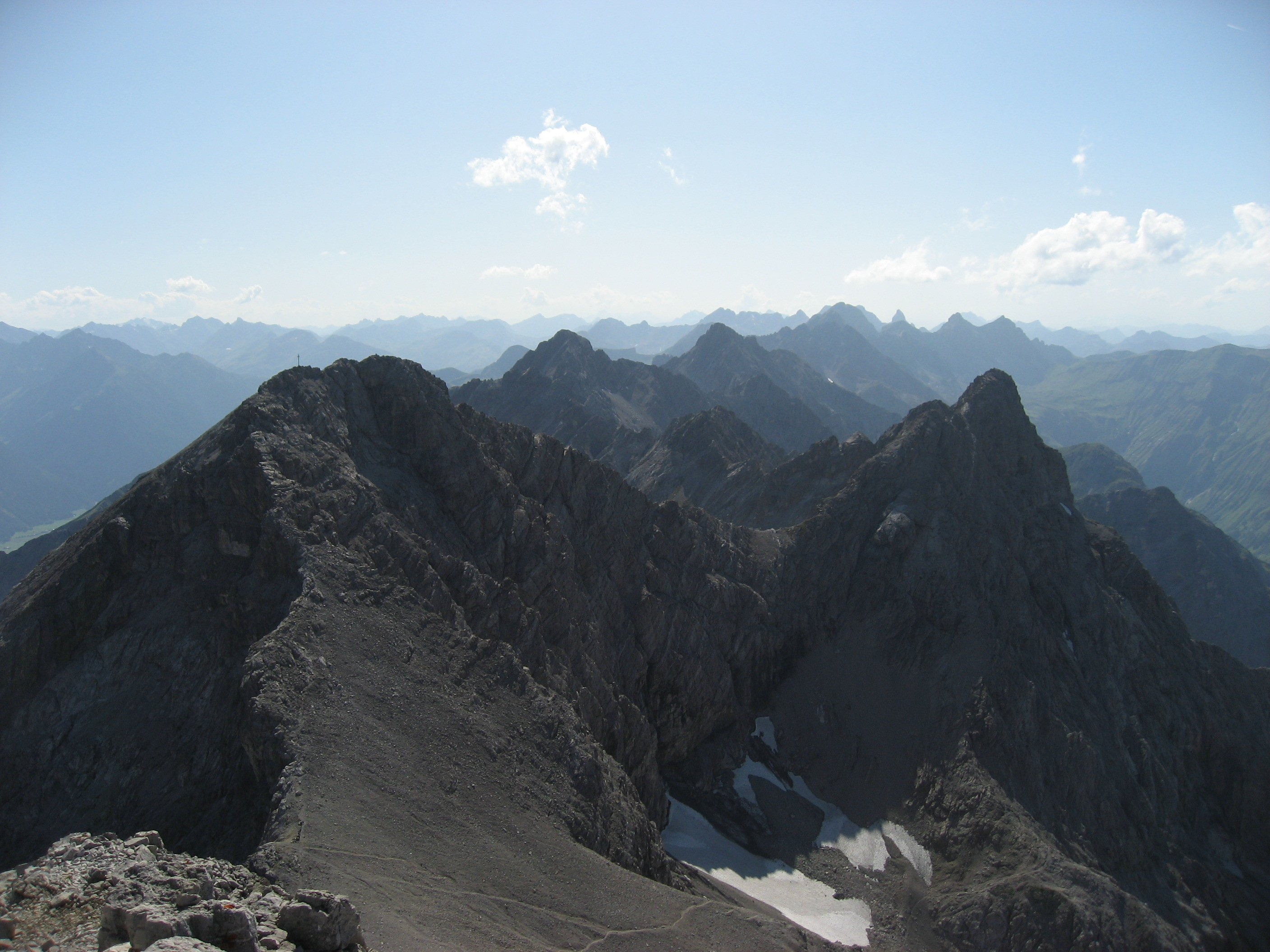 Blick vom Gipfel der Urbeleskarspitze (2632 m) nach Westen zu Bretterspitze (2608 m) und Gliegerkarspitze (2575 m).